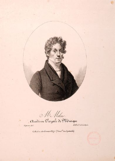 Louis Milon, gravure de Vigneron